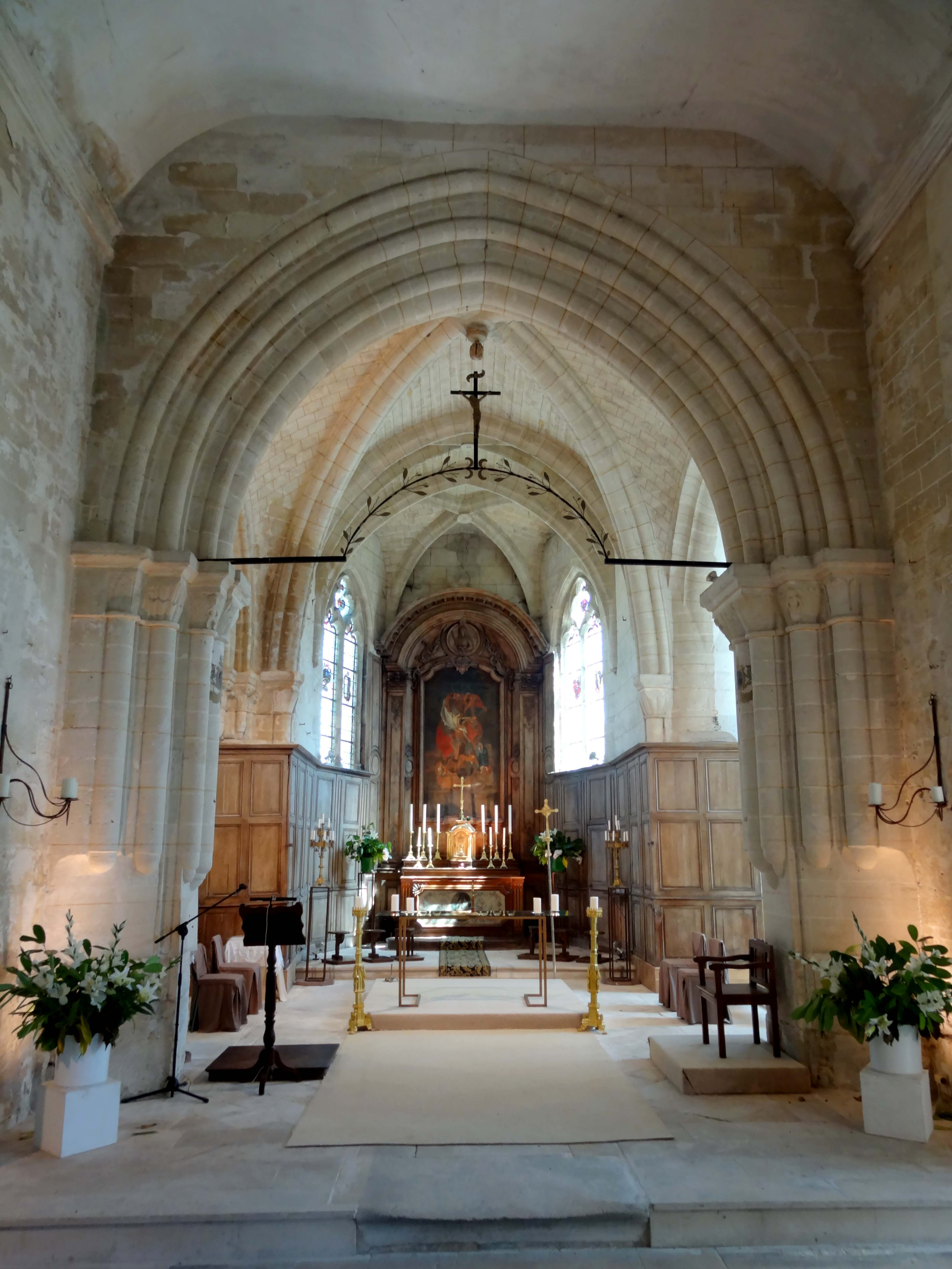 Intérieur de l'église - voir titre.